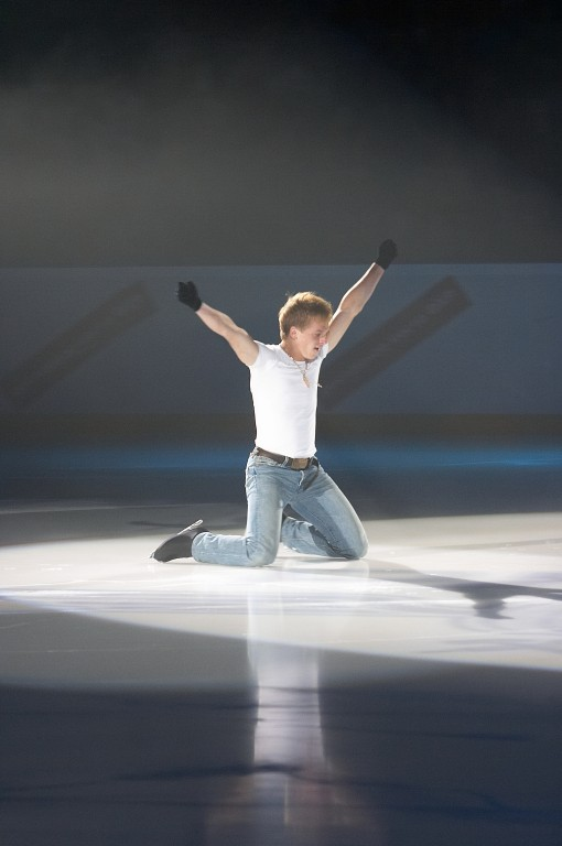 Sergei Voronov